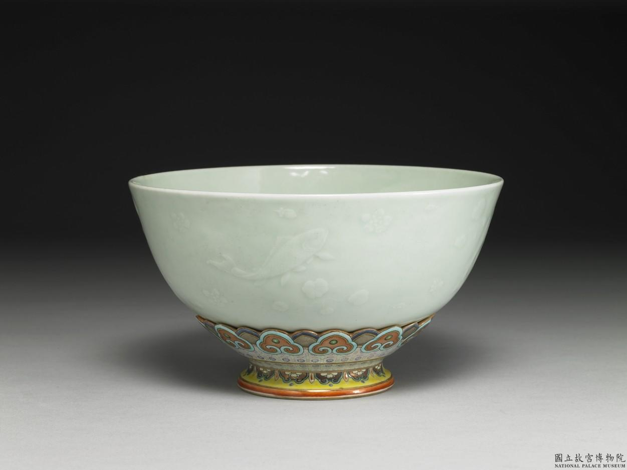 中文（台灣）: 粉彩青瓷轉足碗